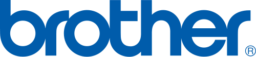 Logotipo da empresa Brother Industries de direito autoral da Brother Industries.